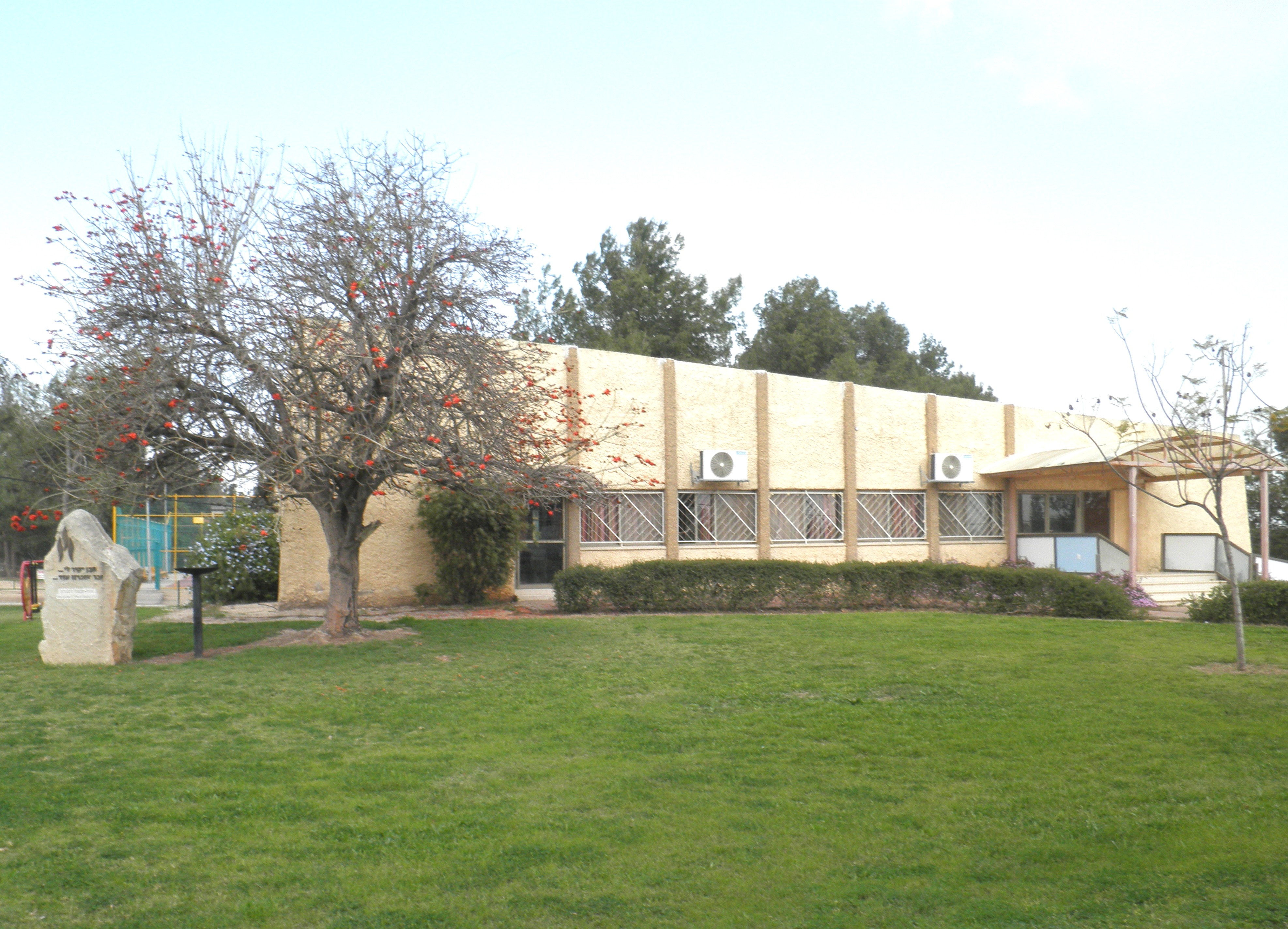 בית העם כפר הרי"ף